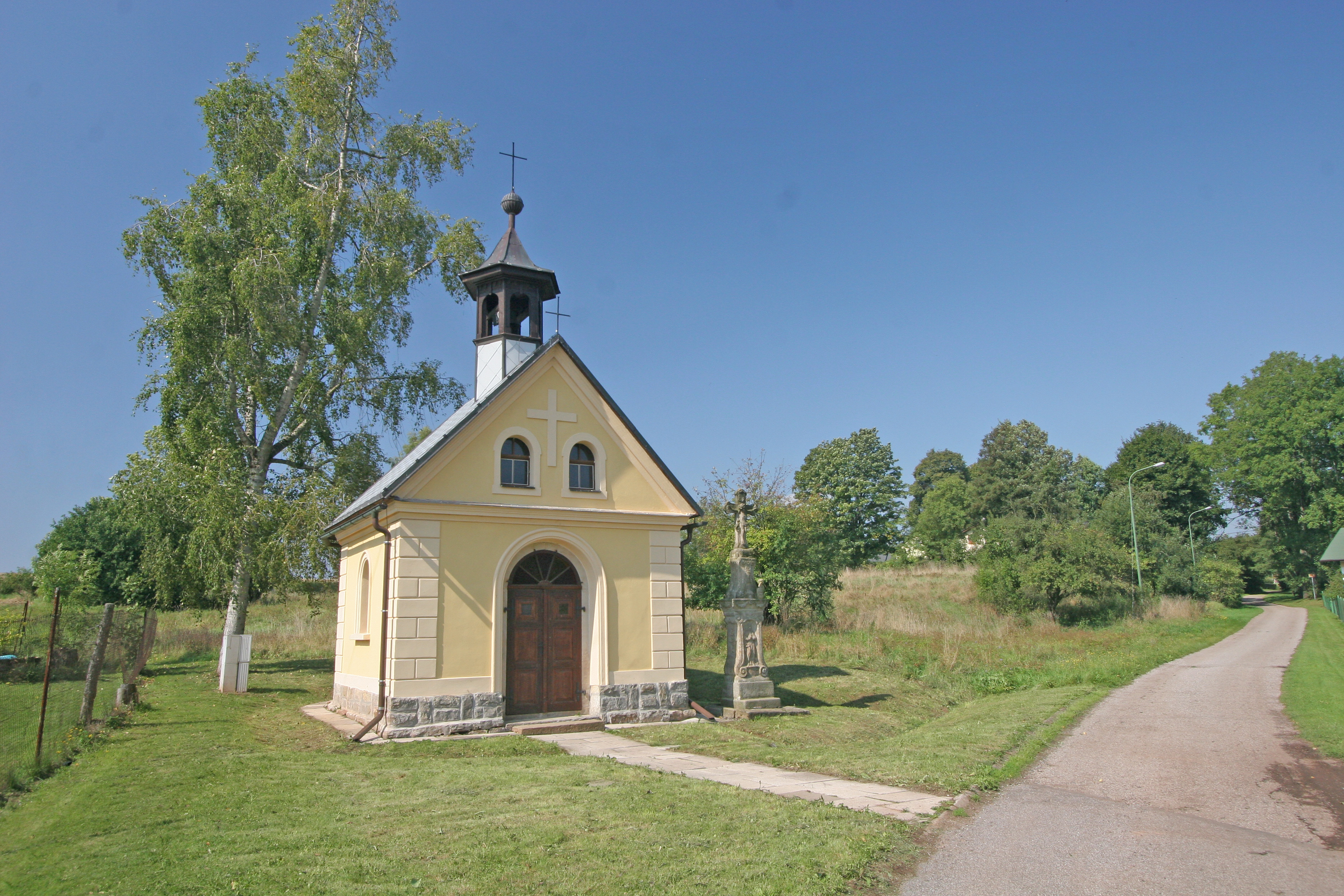 Střítež kaple